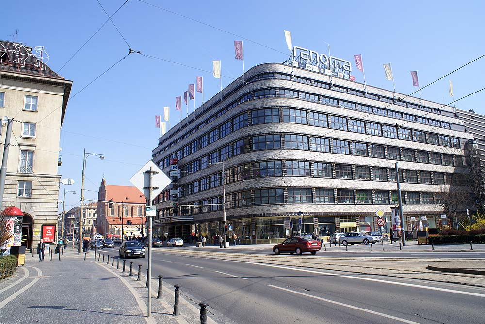 Założenie urbanistyczne plac Kościuszki (w gr. dz. AM-33 nr 2,56,57,58; AM-35 nr 1,8,9,10,11,12; AM-37 nr 37/17, linii zabudowy: pl. Kościuszki, ul. Kościuszki do skrzyżowania z ul. Czystą i z ul. Bałuckiego oraz ul. Świdnicką na odcinku od skrzyżowania z ul. Piłsudskiego do skrzyżowania z ul. Podwale. pl. Kościuszki, Miasto Wrocław - Stare Miasto